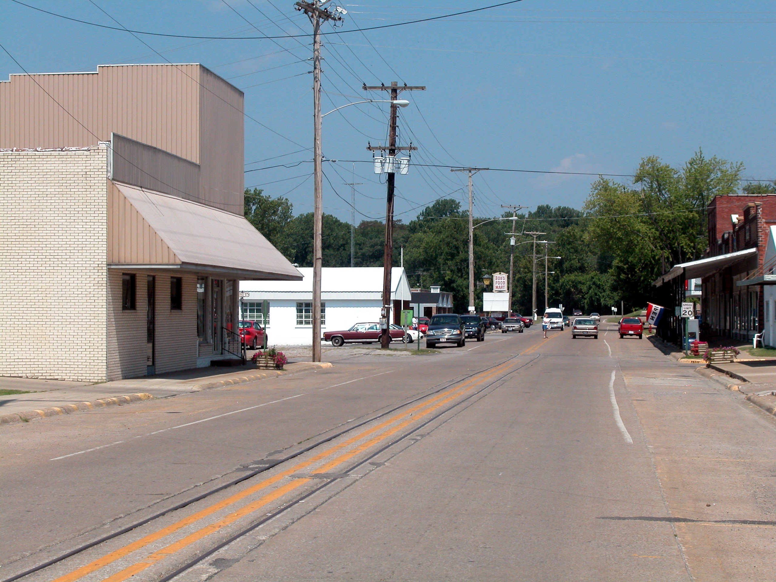 Rosiclare, Illinois